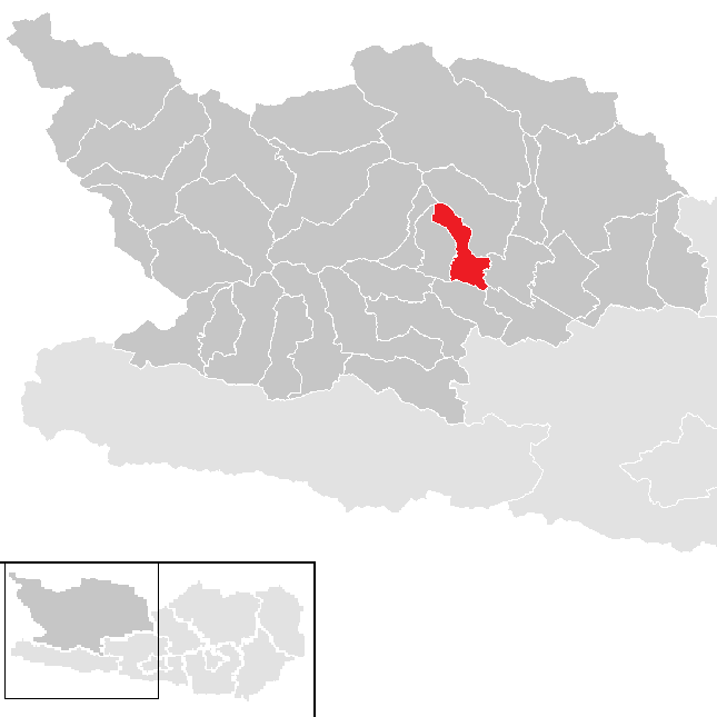 Bezirk Spittal an der Drau